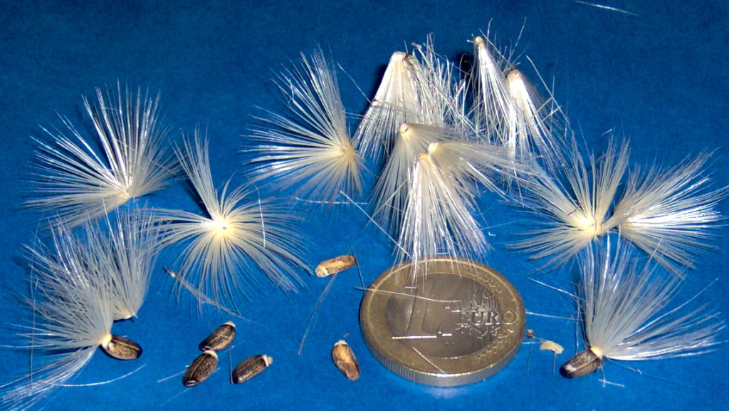 Assianir, mio lavoro, Semi e peluria di cardo_rosso particolare, GNU FDL